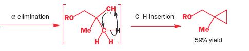 química orgânica avançada